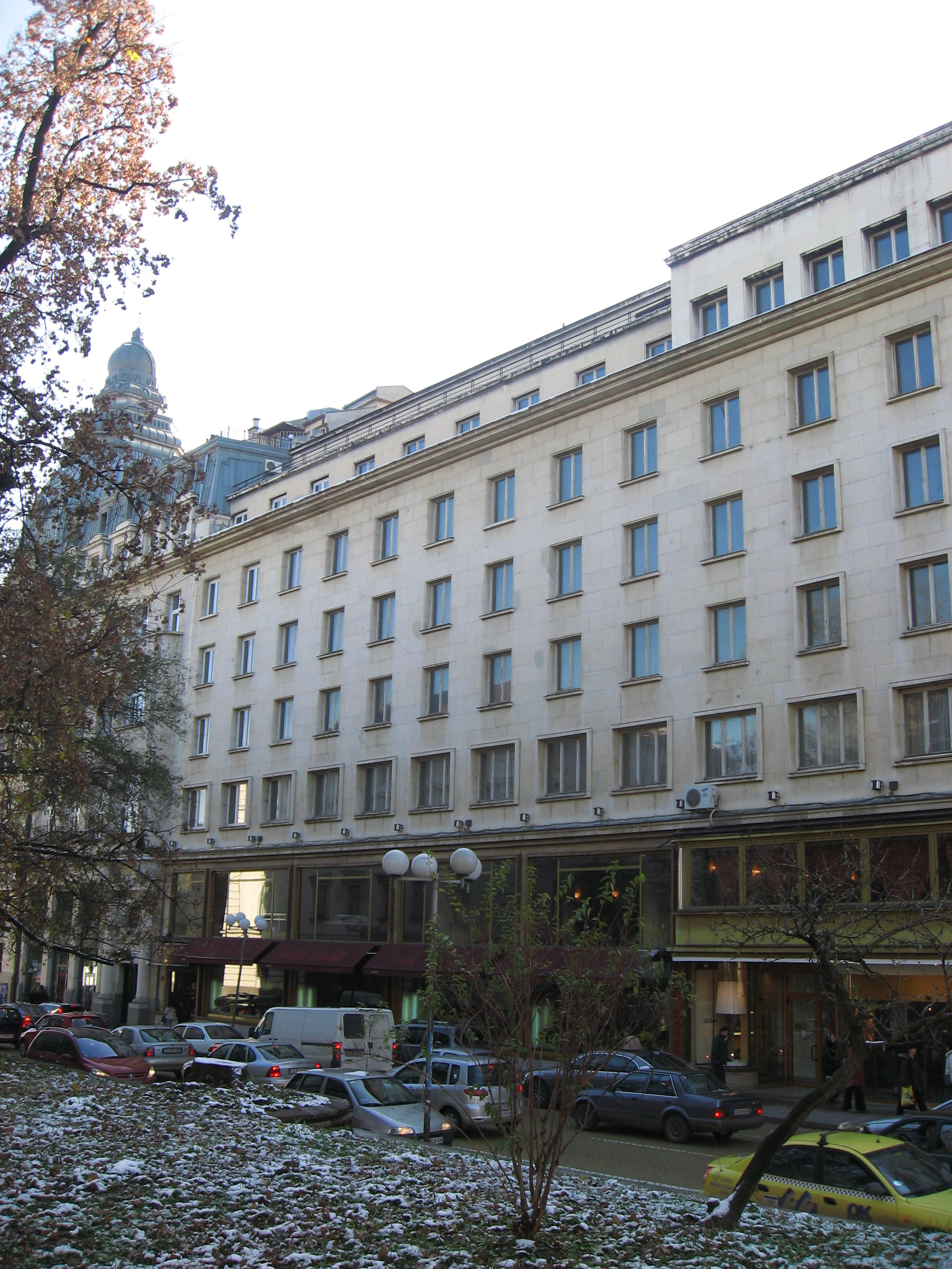 Комплекс България, гледан откъм бул. "Цар Освободител"